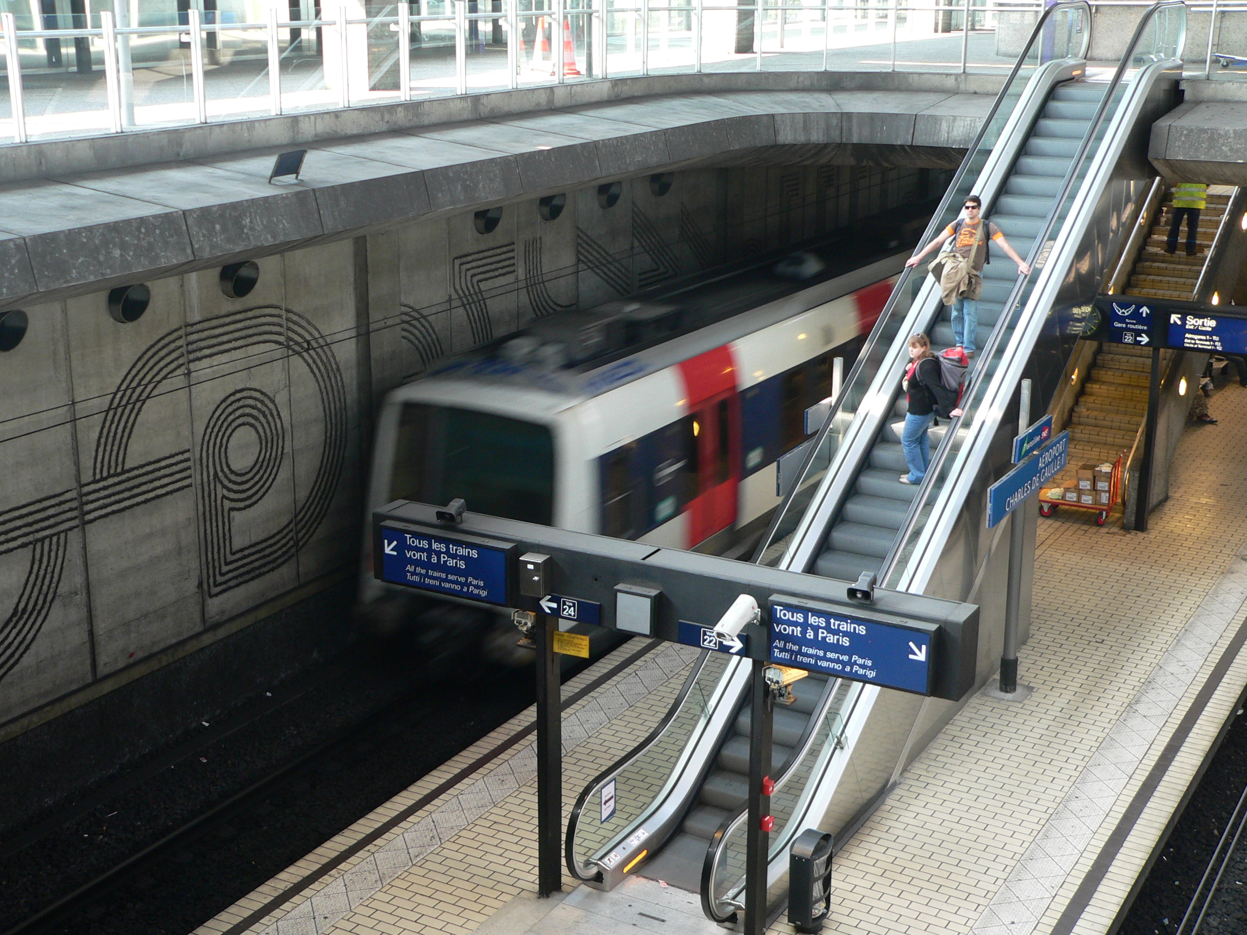 Charles de Gaulle International Airport: RER B station "Aéroport Charles de Gaulle 1" - Roissypôle